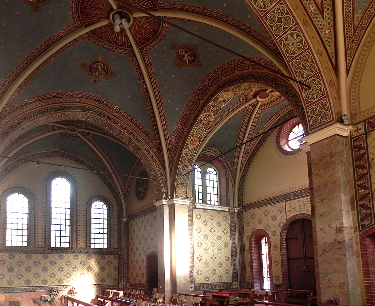 Interno del Santuario del Santissimo Crocifisso a Gorno (BG)